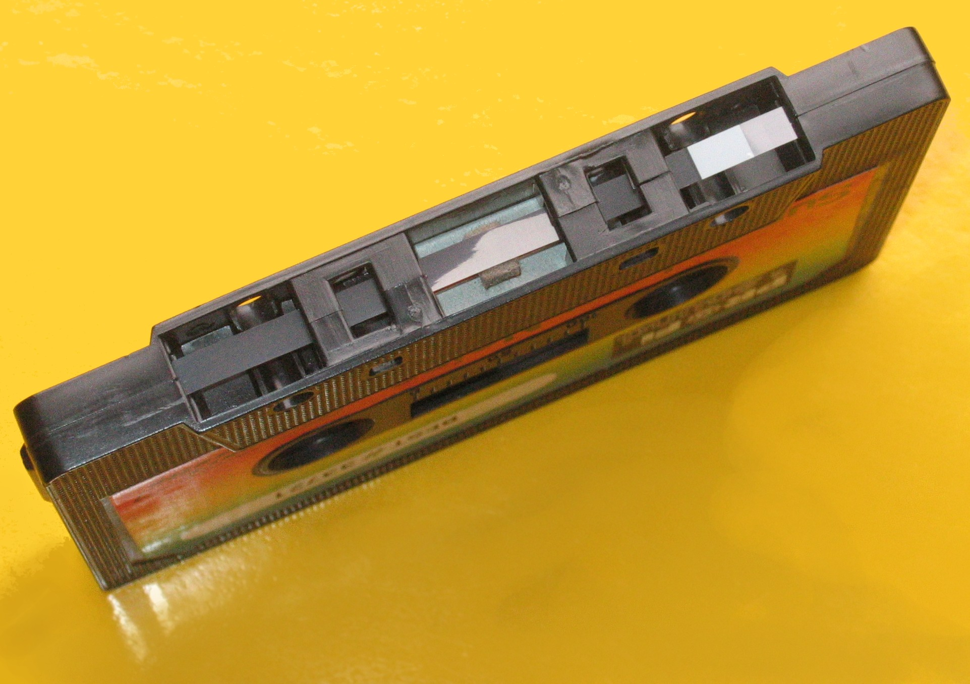 Compact Cassette ProfiSound 60